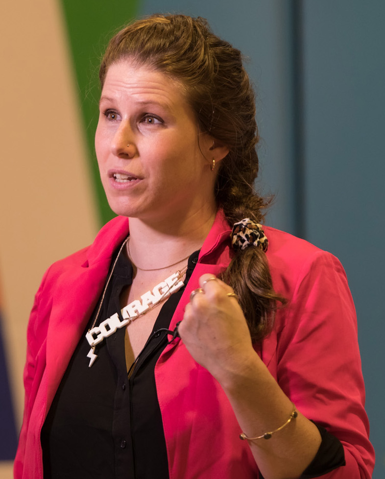 Caroline Criado-Perez, Journalistin, Autorin und feministische Aktivistin beim ODI (Open Data Institute) Summit 2019, Kings Place